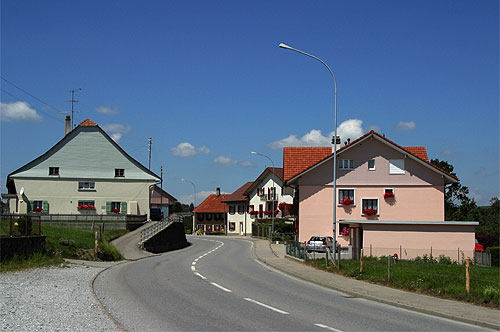 Oestliche Dorfeinfahrt von Vaulruz